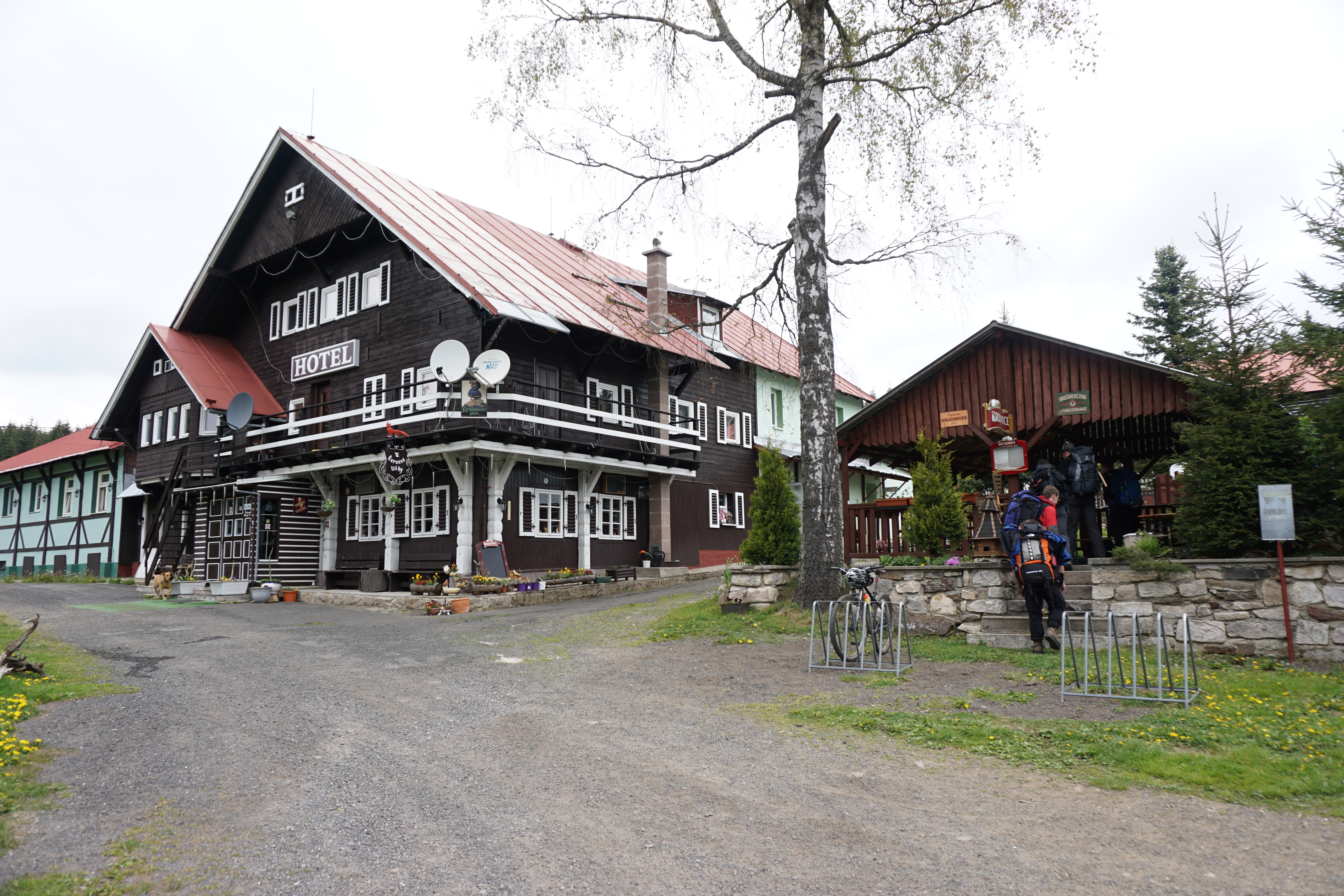 Gaststätte "Roter Fuchs" zwischen Halbemeile und Breitenbach